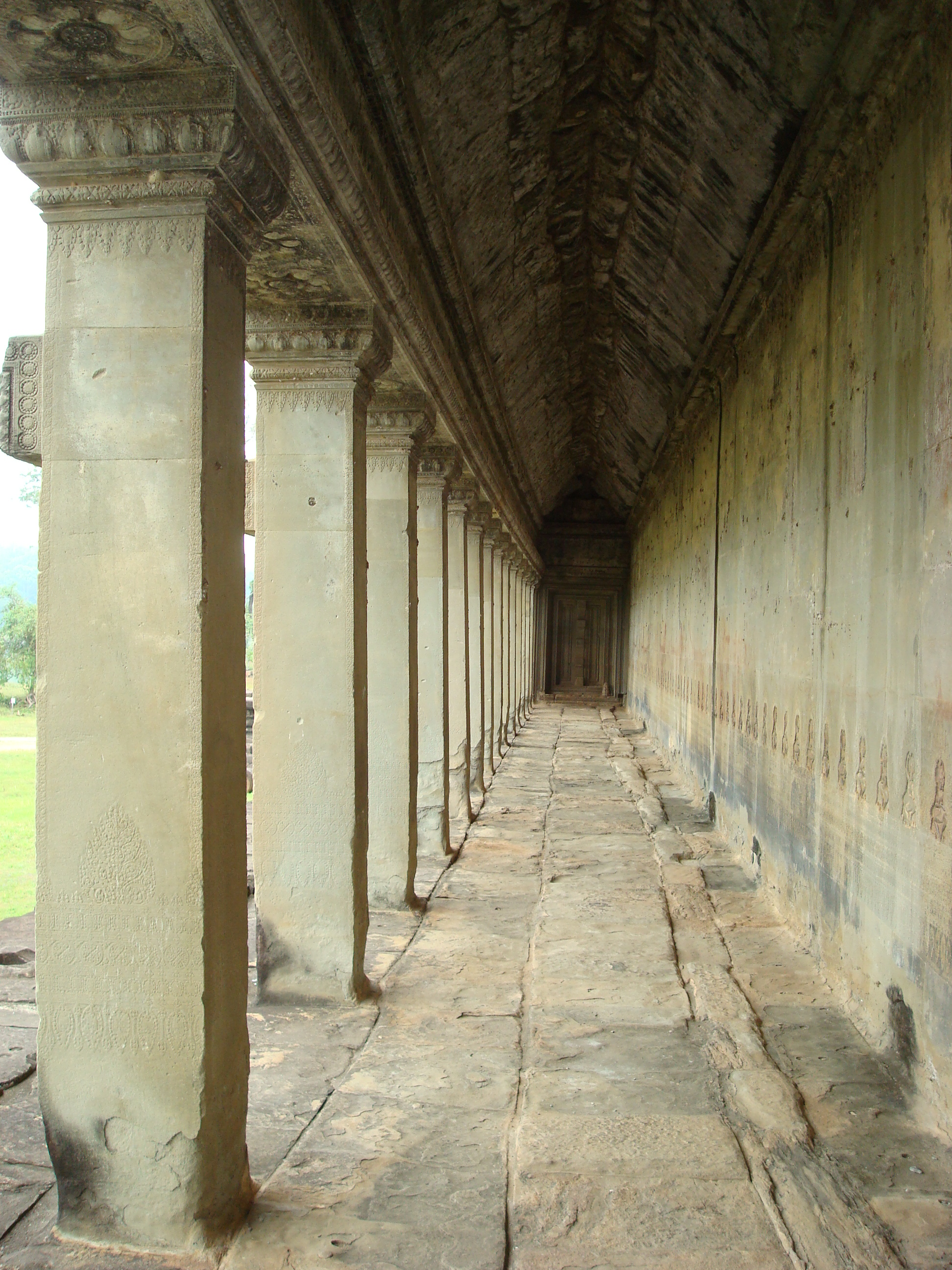 In der Galerie Gopuram vierter Mauerring Angkor Wat